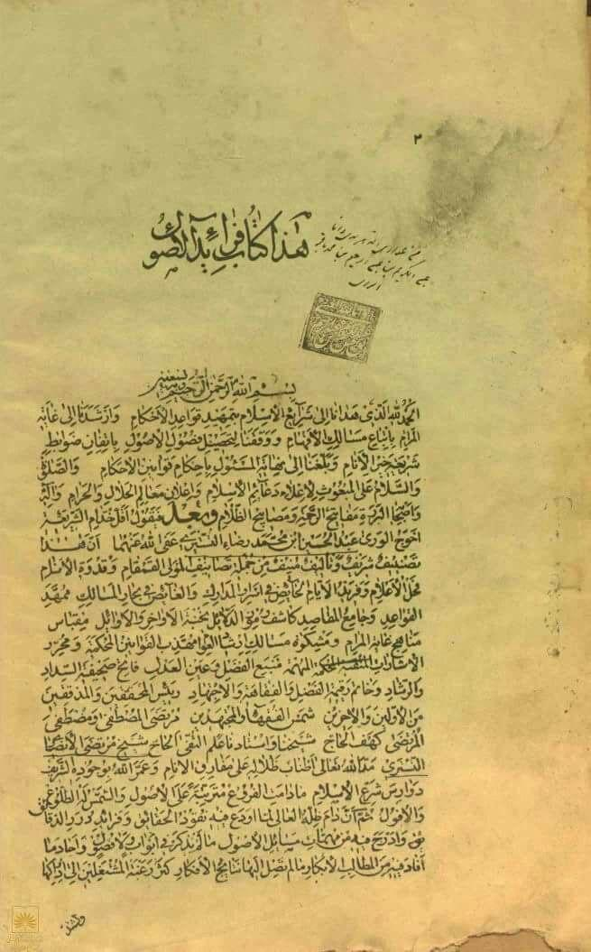 ذکر نام نویسنده کتاب (شیخ مرتضی انصاری شوشتری) در بخش معرفی